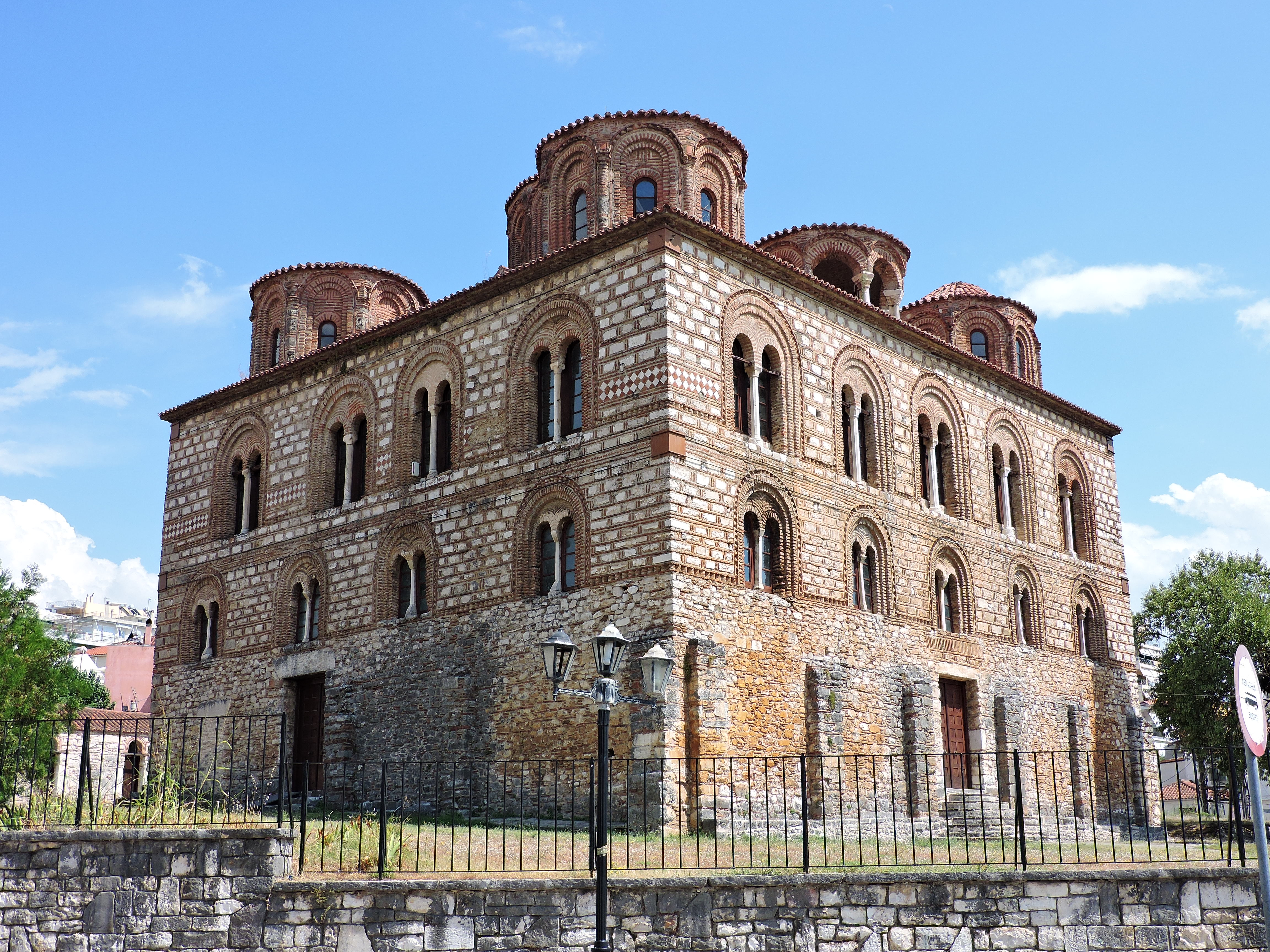 Παναγιά Παρηγορήτισσα 'Αρτα